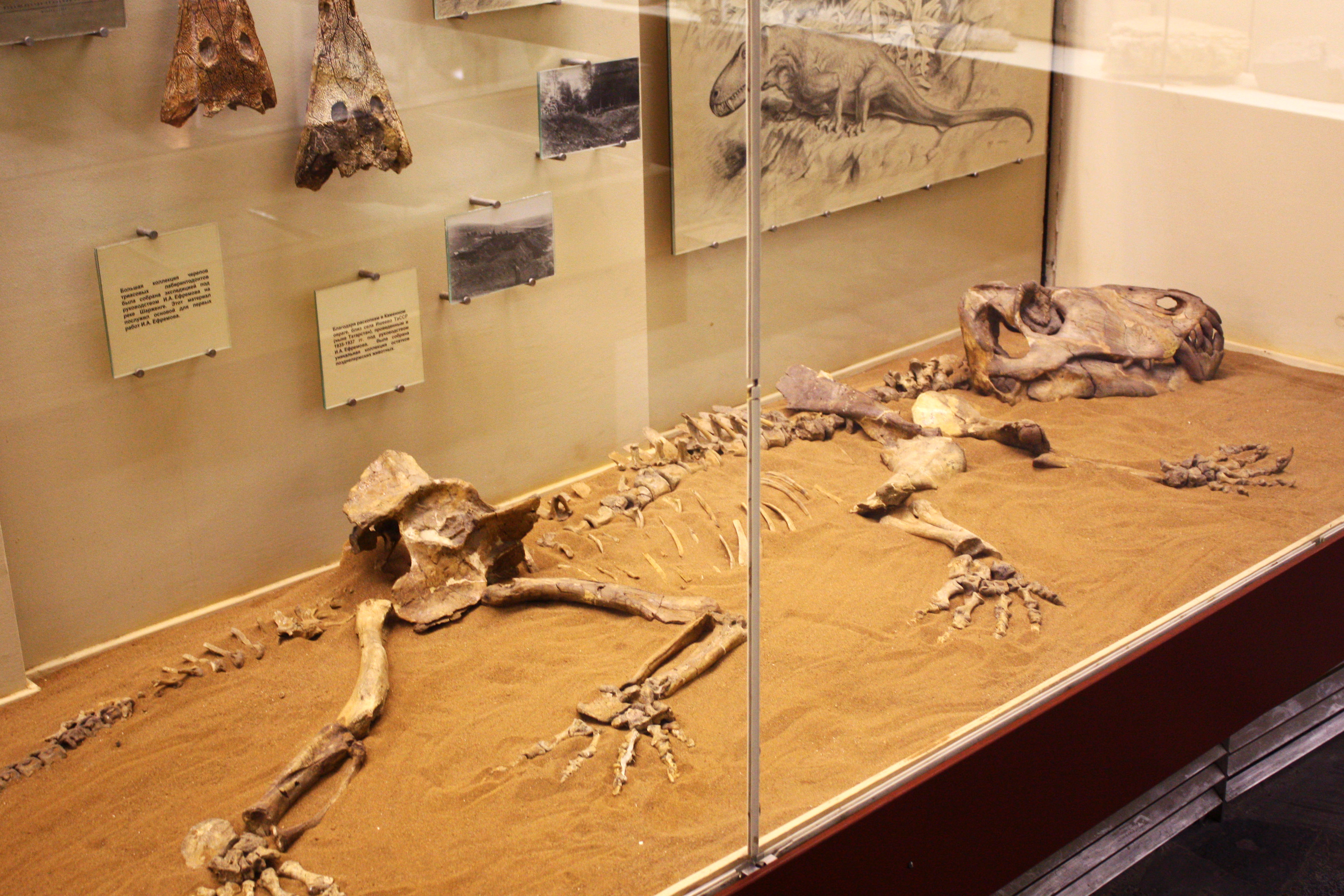 Titanophoneus